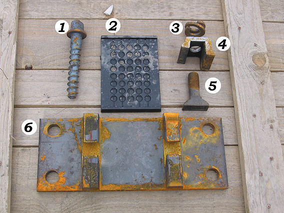 Track fastenings